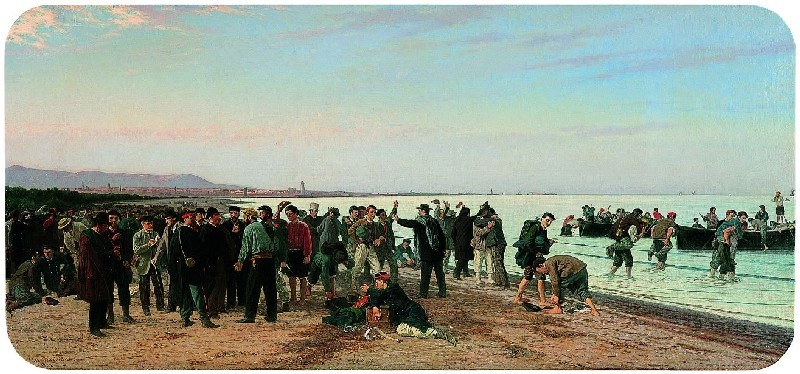 partenza, avvenuta il 9 giugno 1860, dell’ultimo contingente di volontari toscani, prevalentemente livornesi, a sostegno dell’insurrezione di Palermo capeggiata da Garibaldi. La tela fu commissionata a Cesare Bartolena da un gruppo di livornesi costituitosi in comitato e donata al Comune nel 1872.